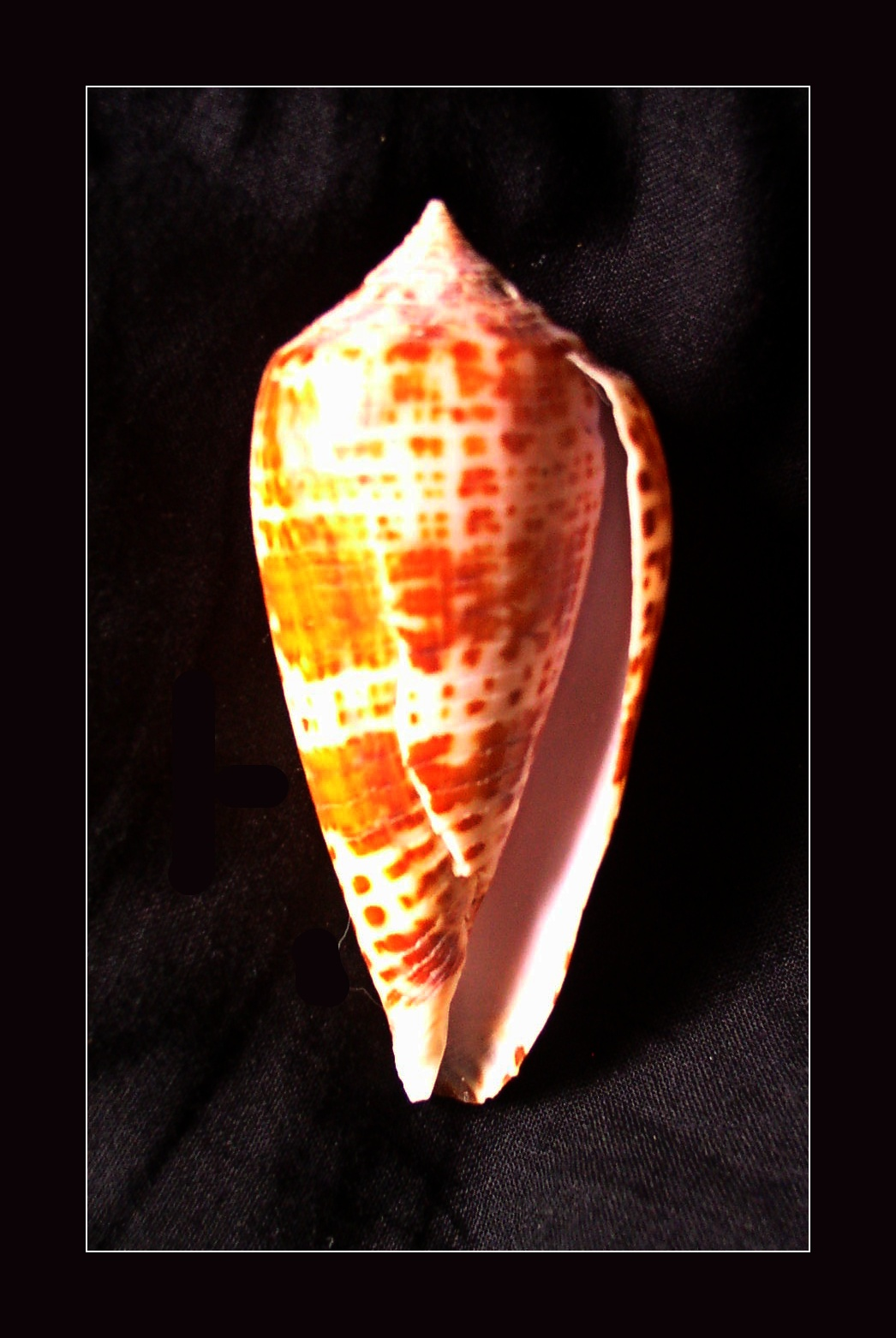 Lynx Cone - Conus lynceus